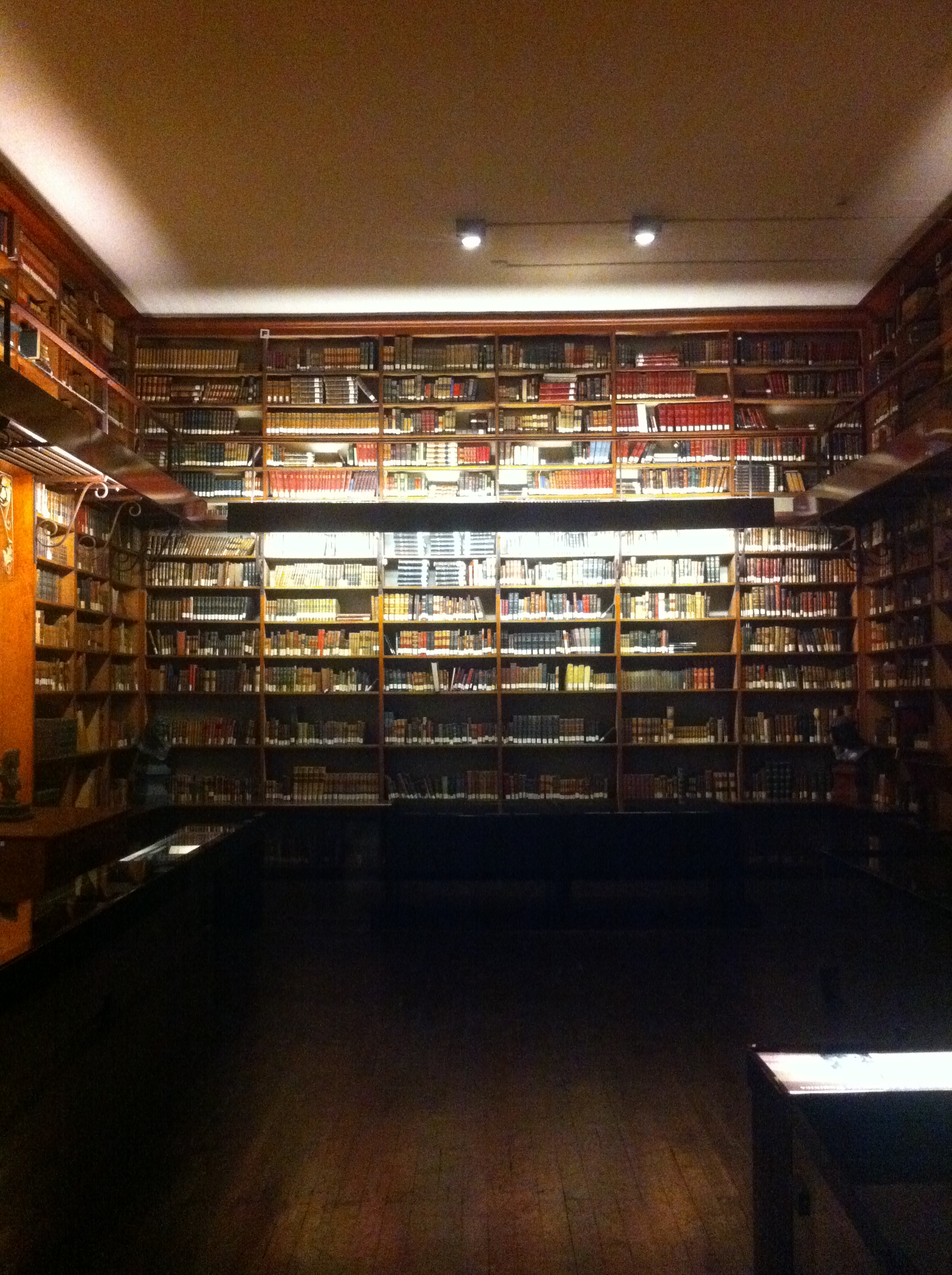 Iglesia y convento de la Recoleta Dominica This is a photo of a national monument in Chile: 229